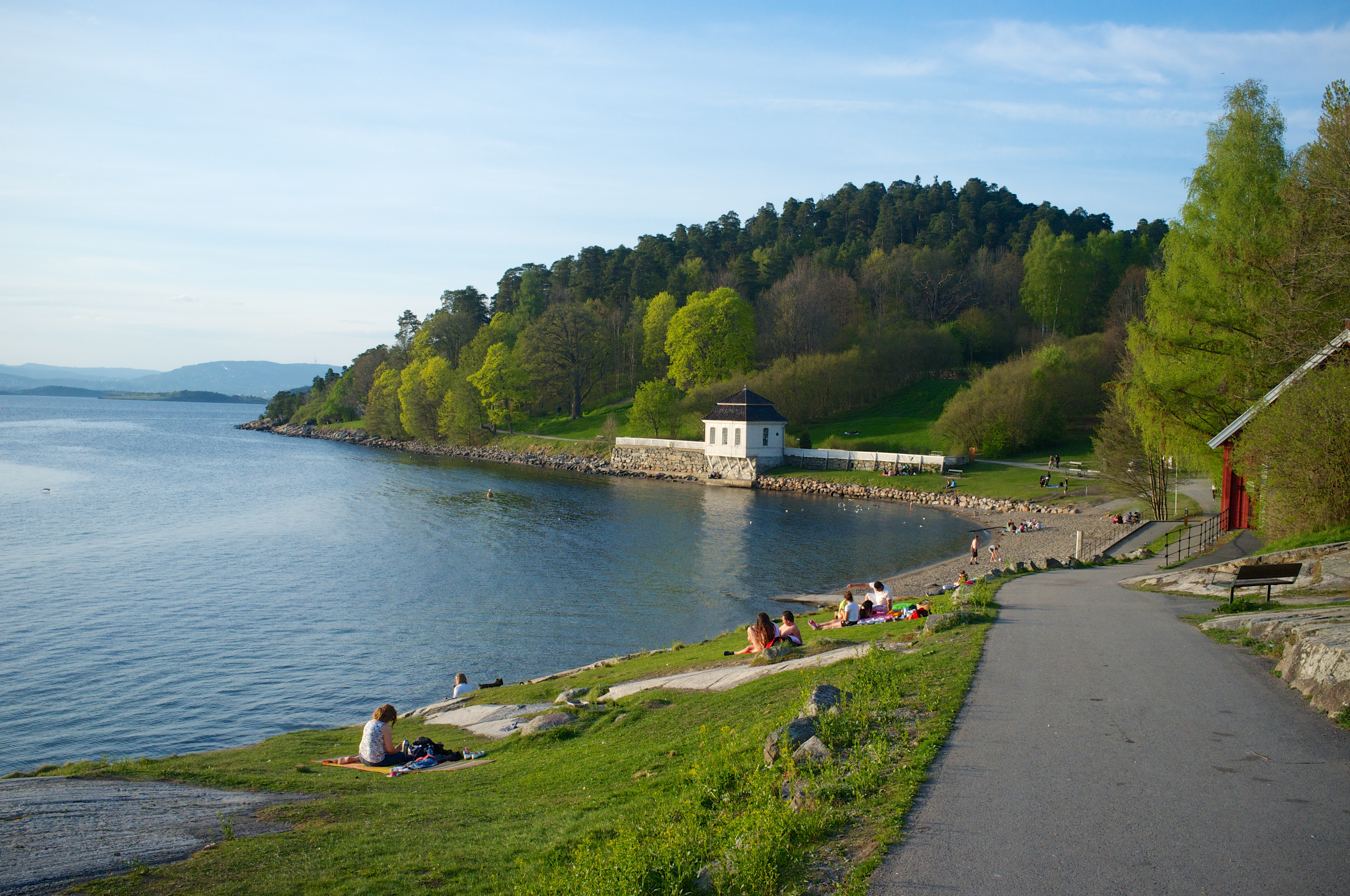 Hvervenbukta i Oslo.